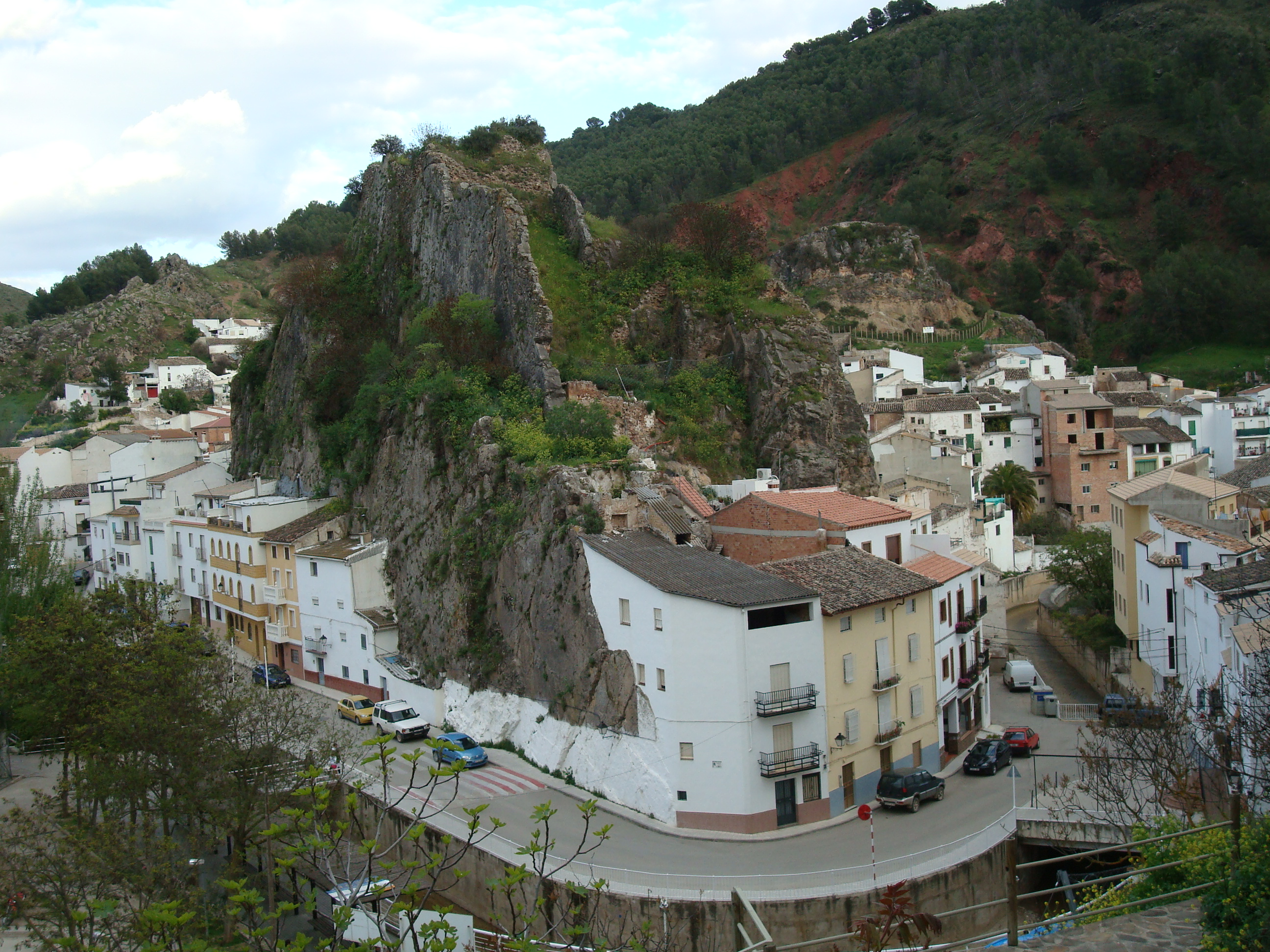 Semana Santa 2009 en Cambil, Sierra Mágina.